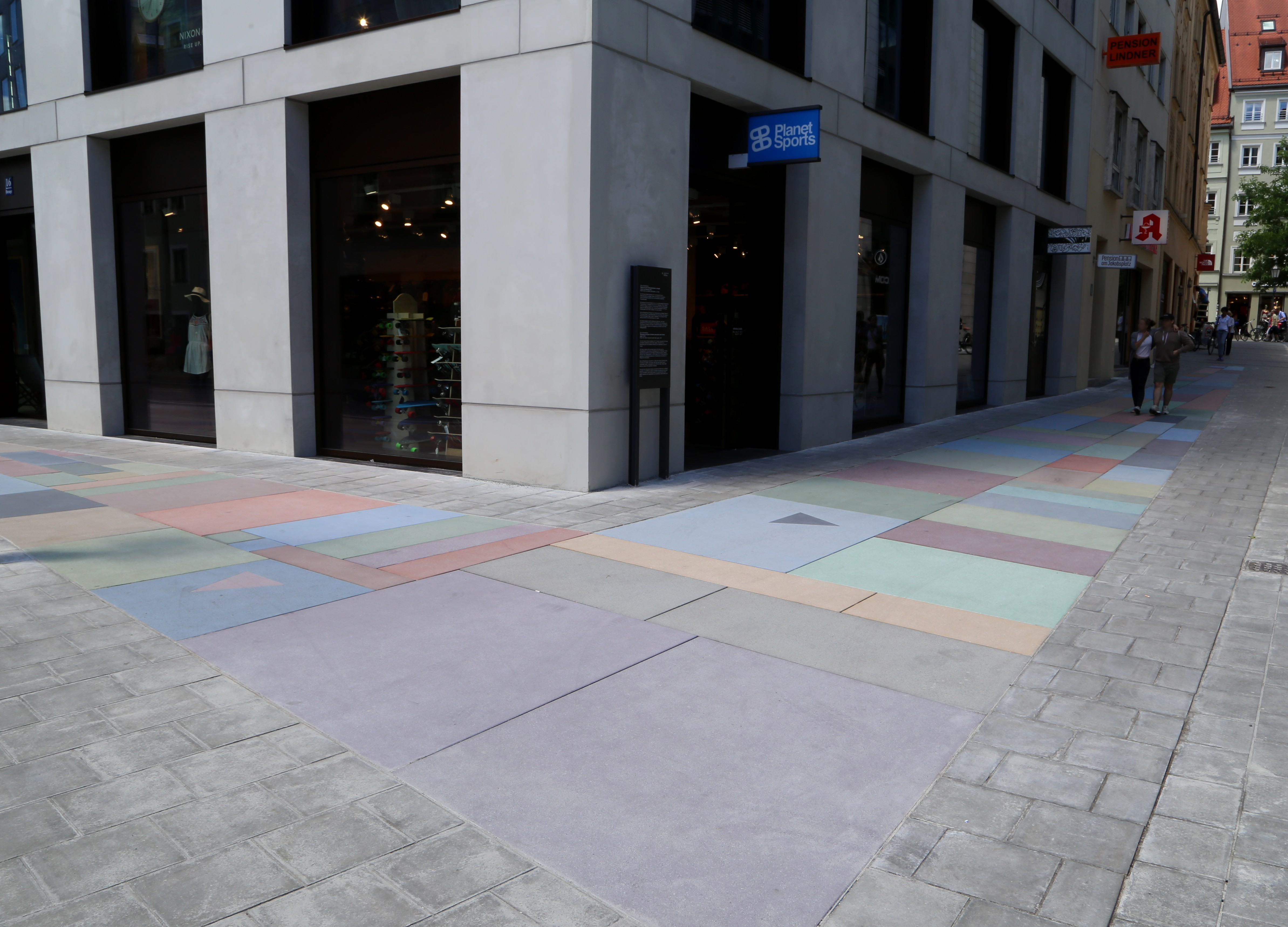 Denkmal für die in der NS-Zeit verfolgten Lesben und Schwulen, Oberanger/Dultstraße, München; der Entwurf stammt von der Künstlerin Ulla von Brandenburg.